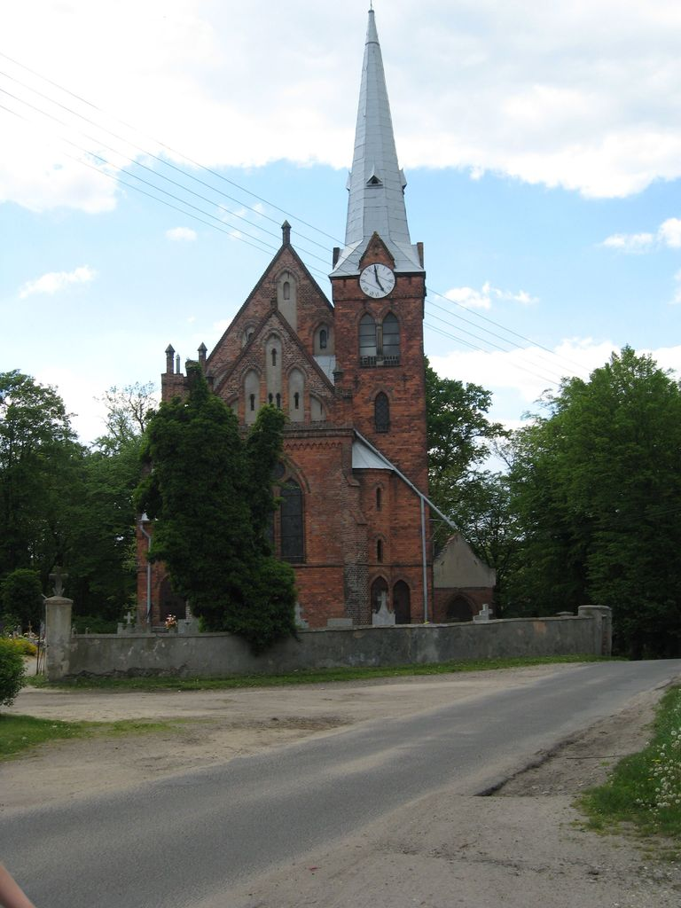 Modła - rzymskokatolicki kościół p.w. Matki Bożej Różańcowej, 1875-1877